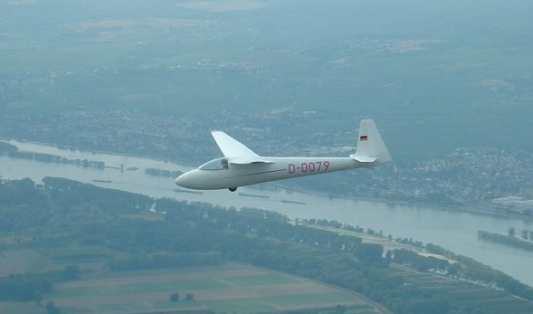 Schleicher Ka 6e